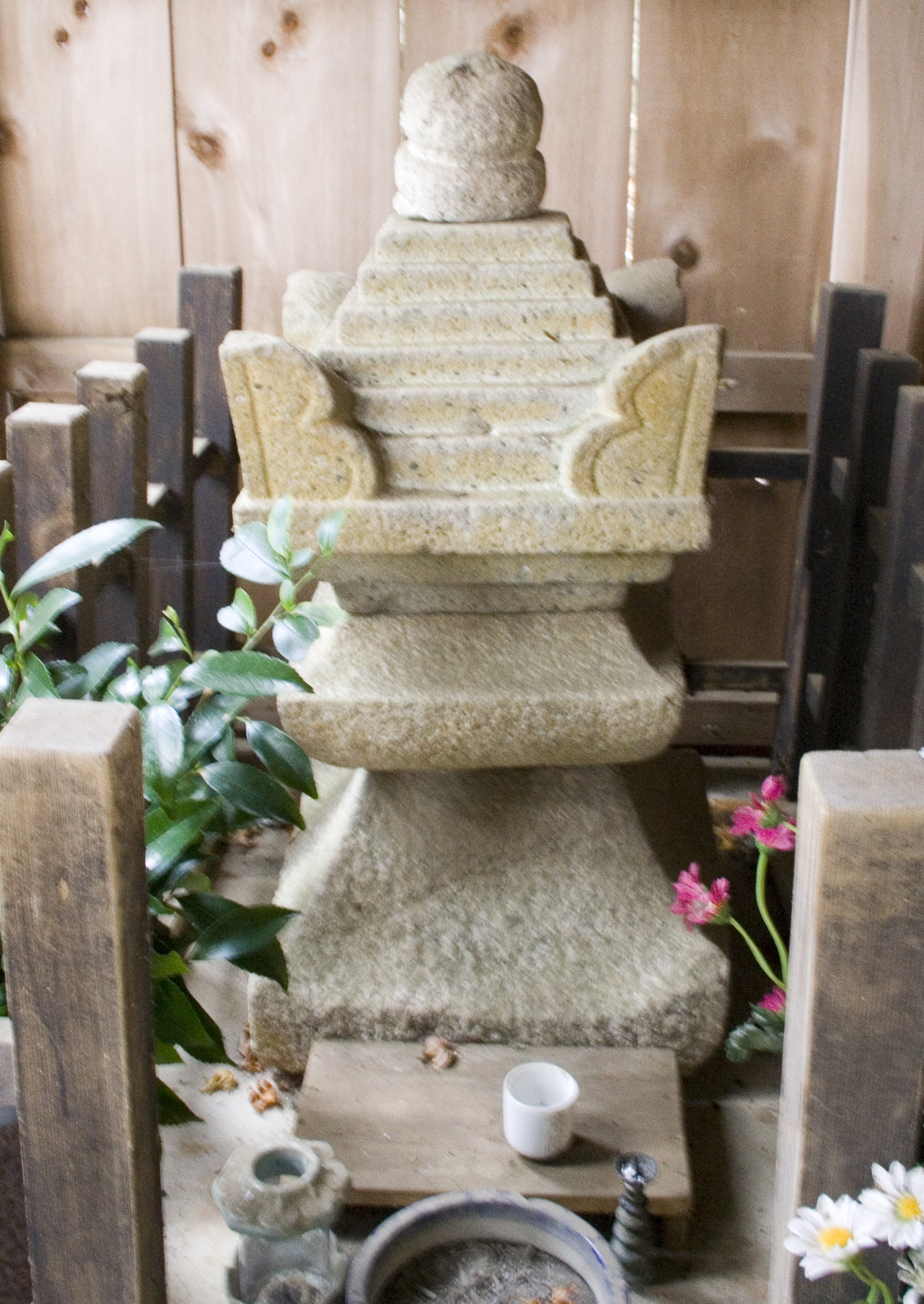 本山寺 石造宝篋印塔